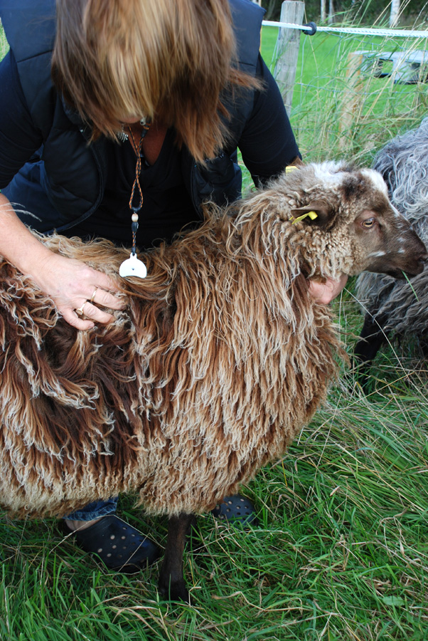 Ryafår.